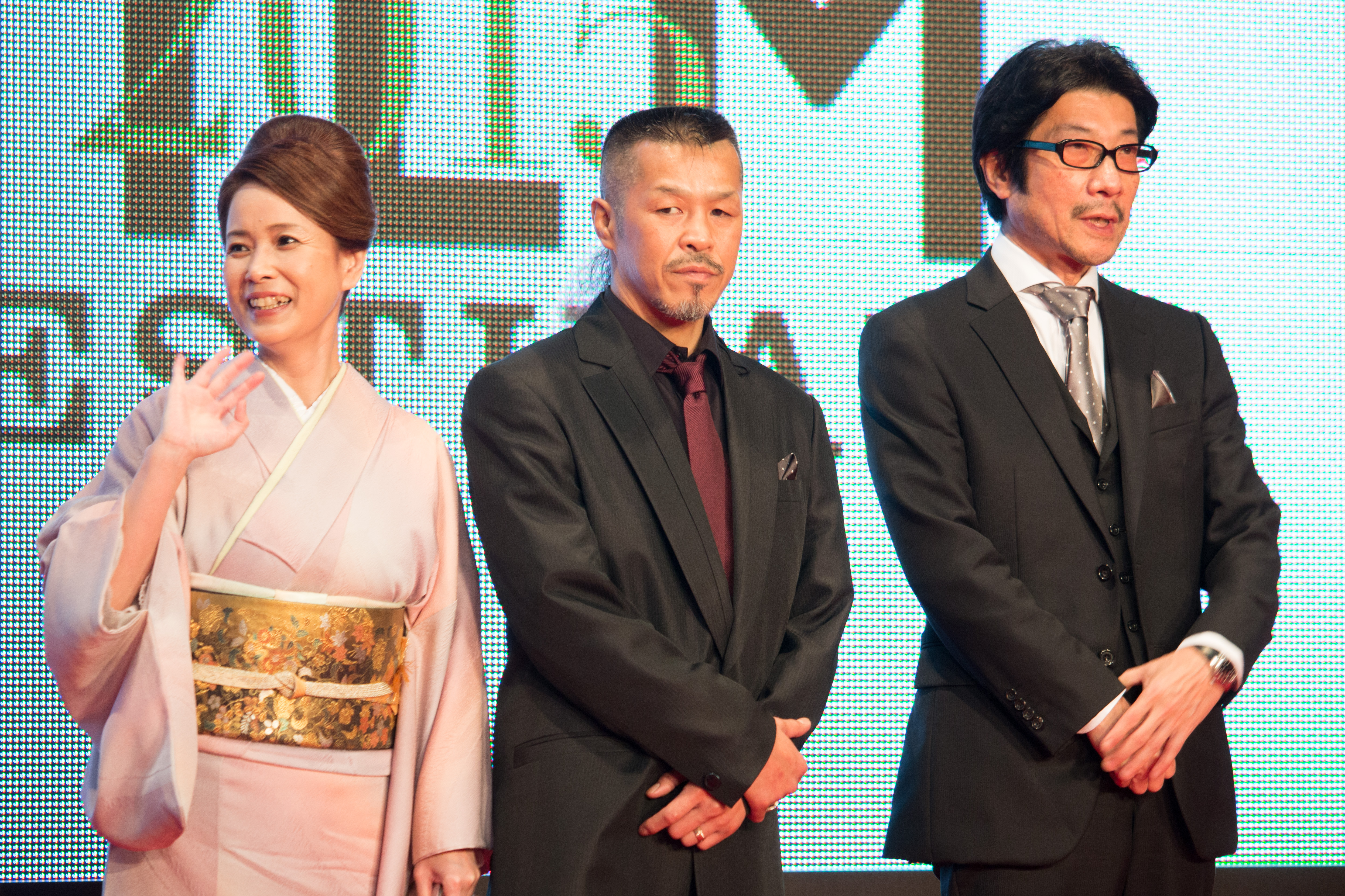 第28回 東京国際映画祭 オープニングセレモニー 辰一郎 阪本順治 (ジョーのあした)